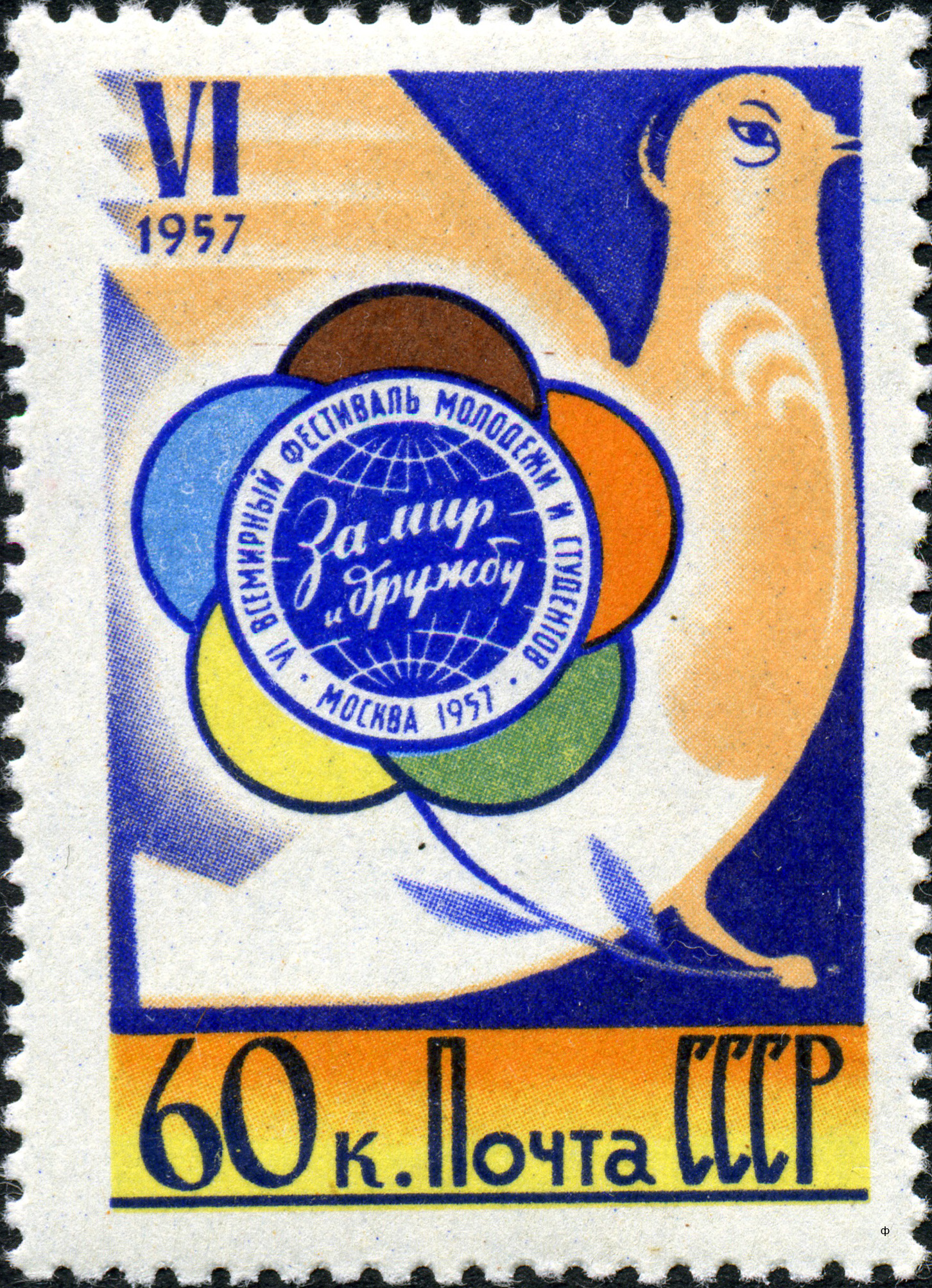 Почтовая марка СССР. VI Всемирный фестиваль молодёжи и студентов, Москва. 60 копеек, 1957 год